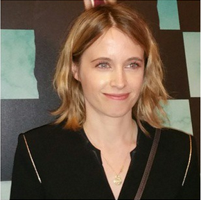 Elodie Namer présente son fil "Le Tournoi" au Festival de Colcoa à Los Angeles le 22 avril 2015